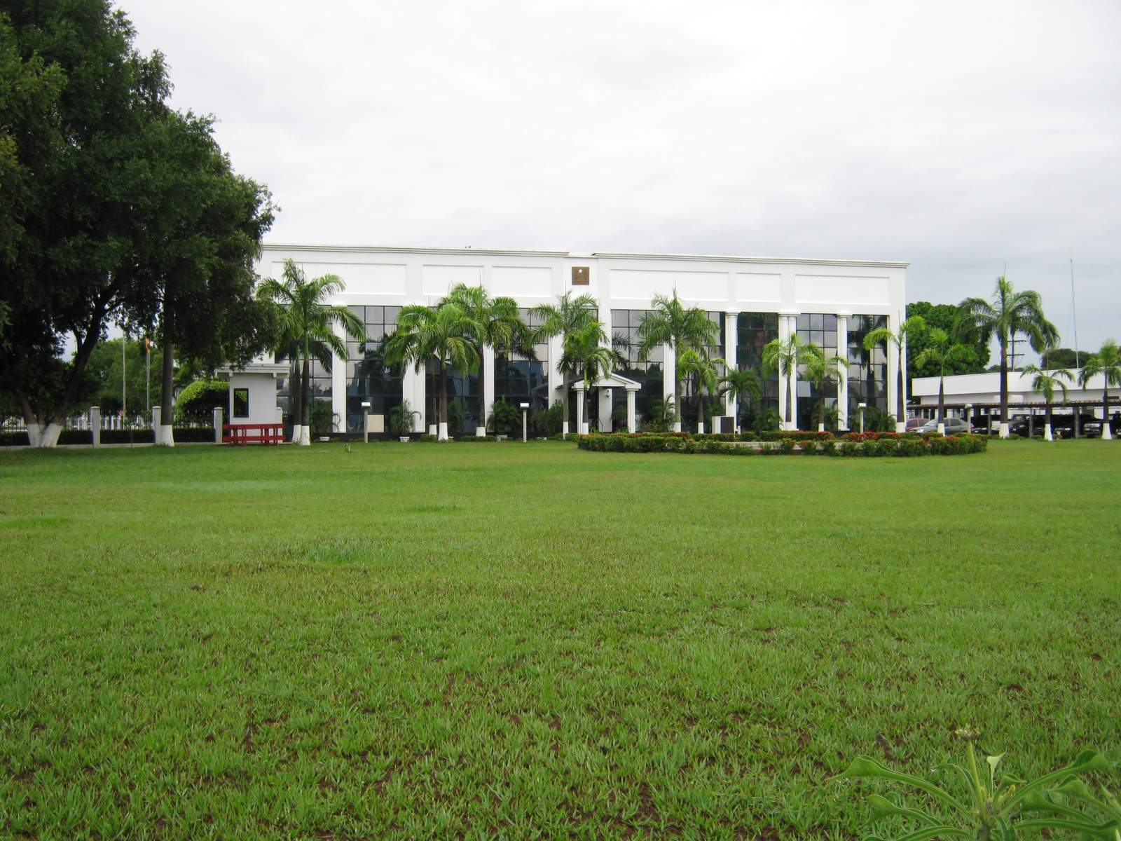 Palácio Senador Hélio Campos, sede do Governo de Roraima